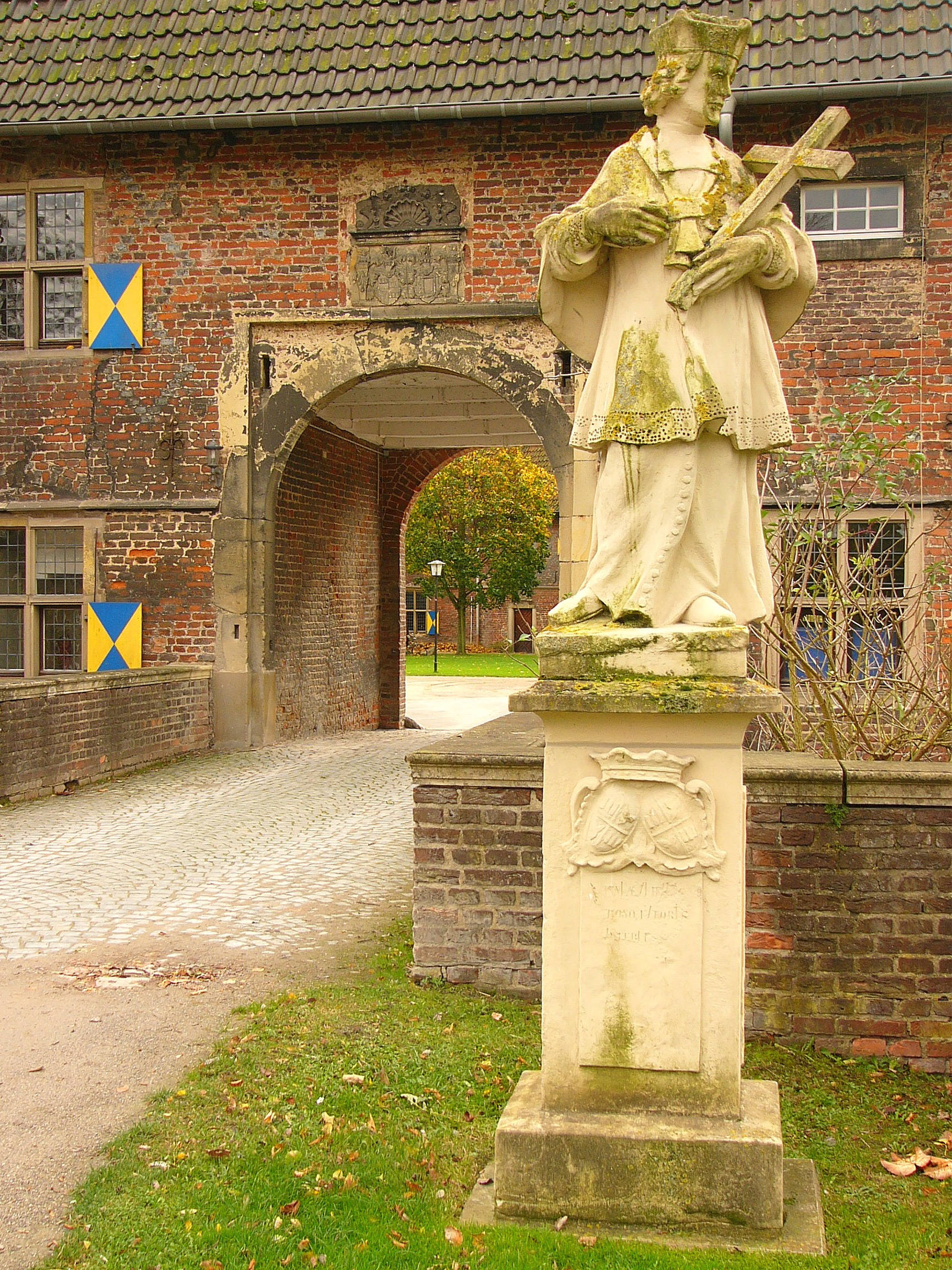 Nepomuk-Figur am Schloss Heessen.This is a photograph of an architectural monument.